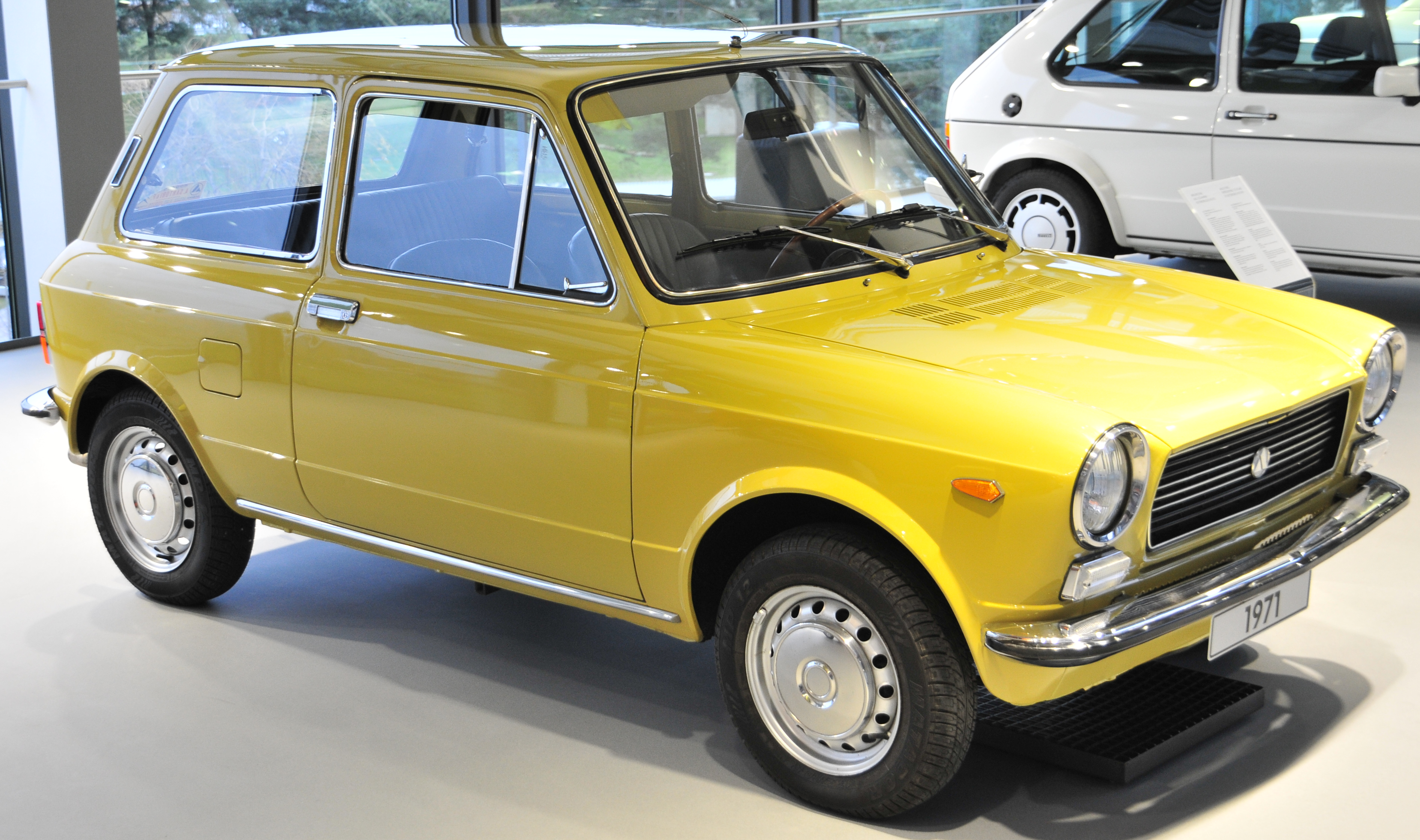 Fahrzeug in der Autostadt Wolfsburg